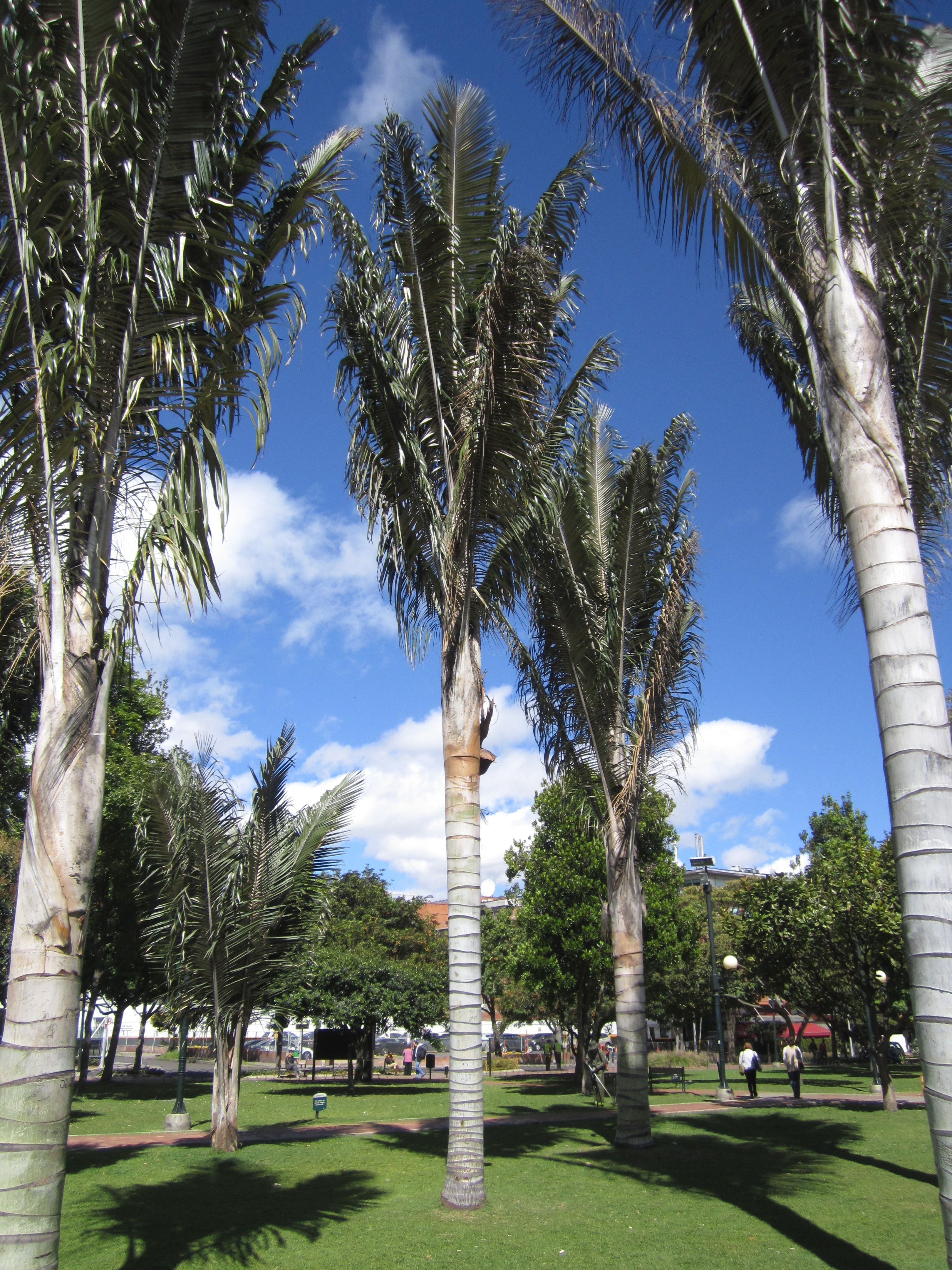 Palma de cera en el Parque de la 93 con calle Doce. Barrio Chicó, norte Bogotá.